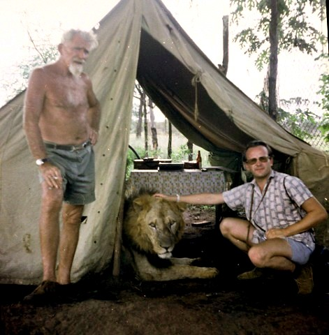 КЕНИЯ. Национальный парк Меру В этой палатке среди буша,на территории созданного Адамсонами нынешнего Национального парка Меру, Джордж жил вместе со львом Боем, сыгравшем главную «мужскую роль» в фильме «Рождённая свободной».